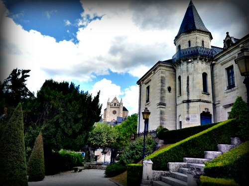 La tour du château Jeanne d'Arc et l'Abbaye Saint-Sour de Terrasson-Lavilledieu en Dordogne.